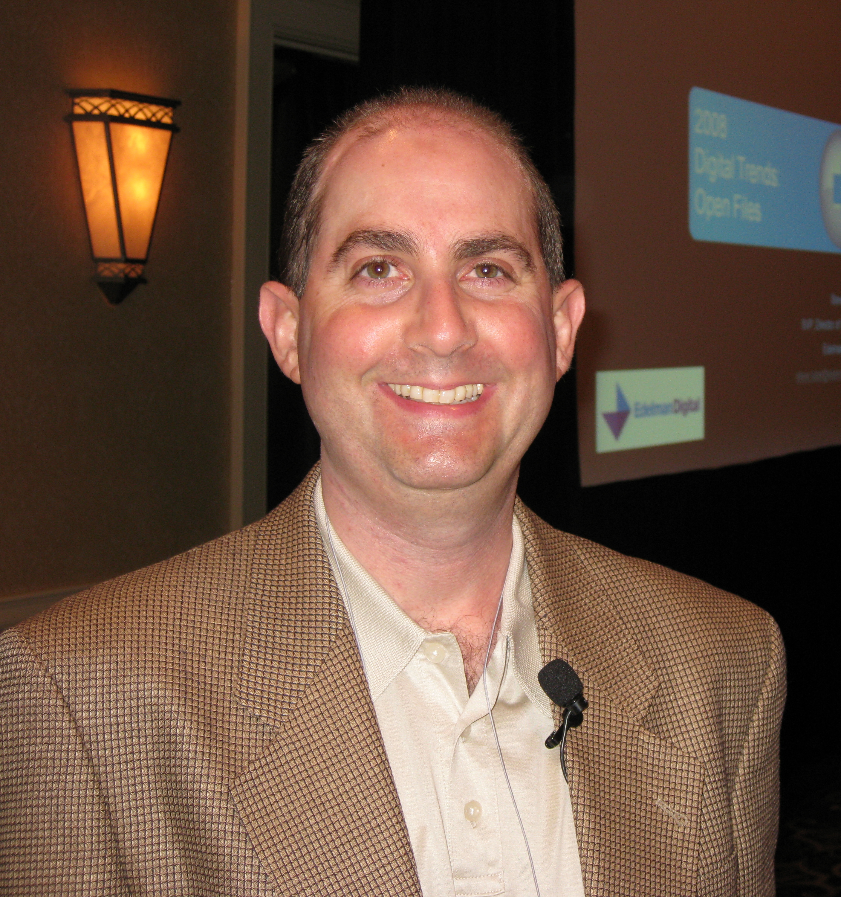 Steve Rubel